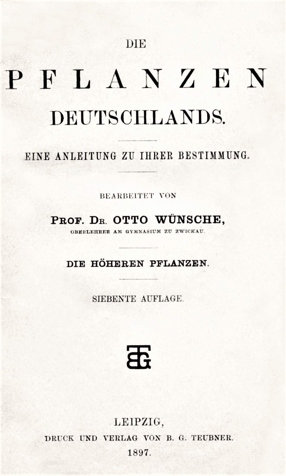 Dr. Otto Wünsche: "Die Pflanzen Deutschlands: Eine Anleitung zu ihrer Kenntnis", Verlag B. G. Teubner, Leipzig 1897